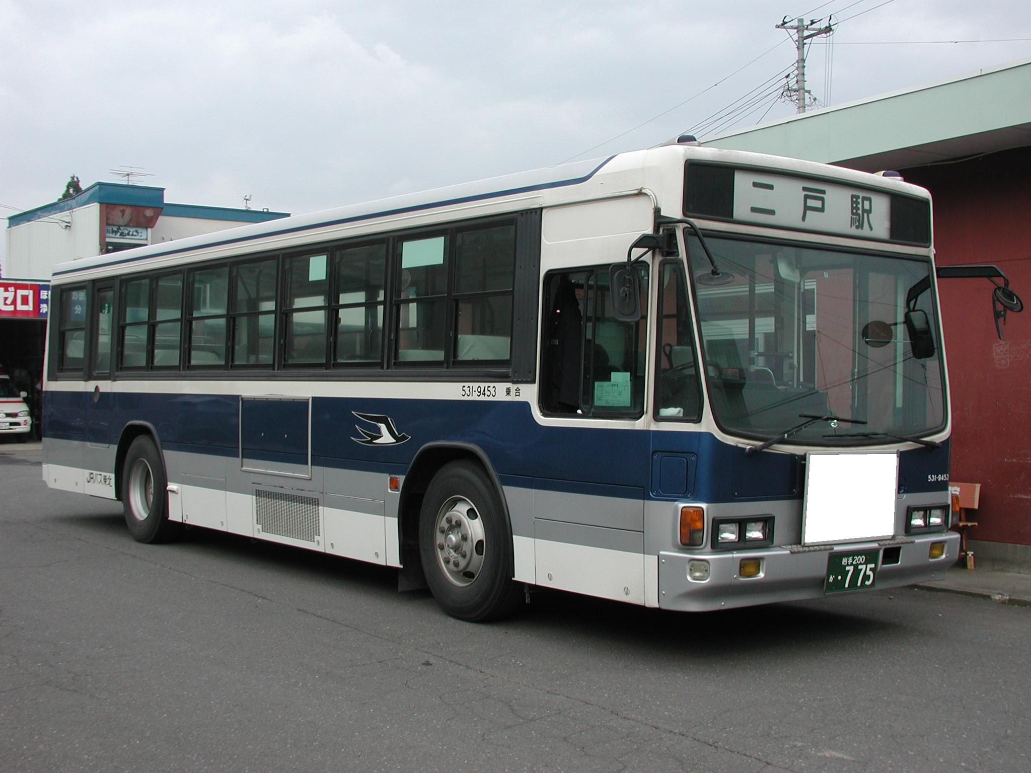 ジェイアールバス東北一般路線車（いすゞ・キュービック：KC-LV380N/社番：531-9453）浄法寺駅にて（先頭の民間企業広告部分に隠し処理加工済み）